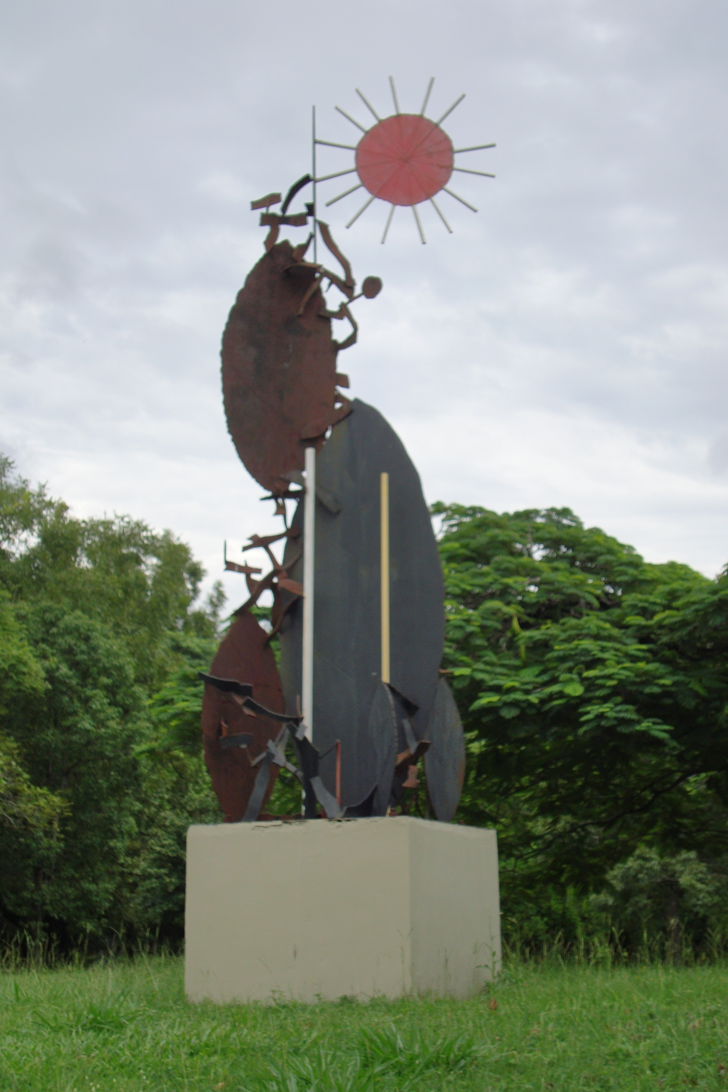 Monumento do Parque Marinha do Brasil, criado por Francisco Stockinger.